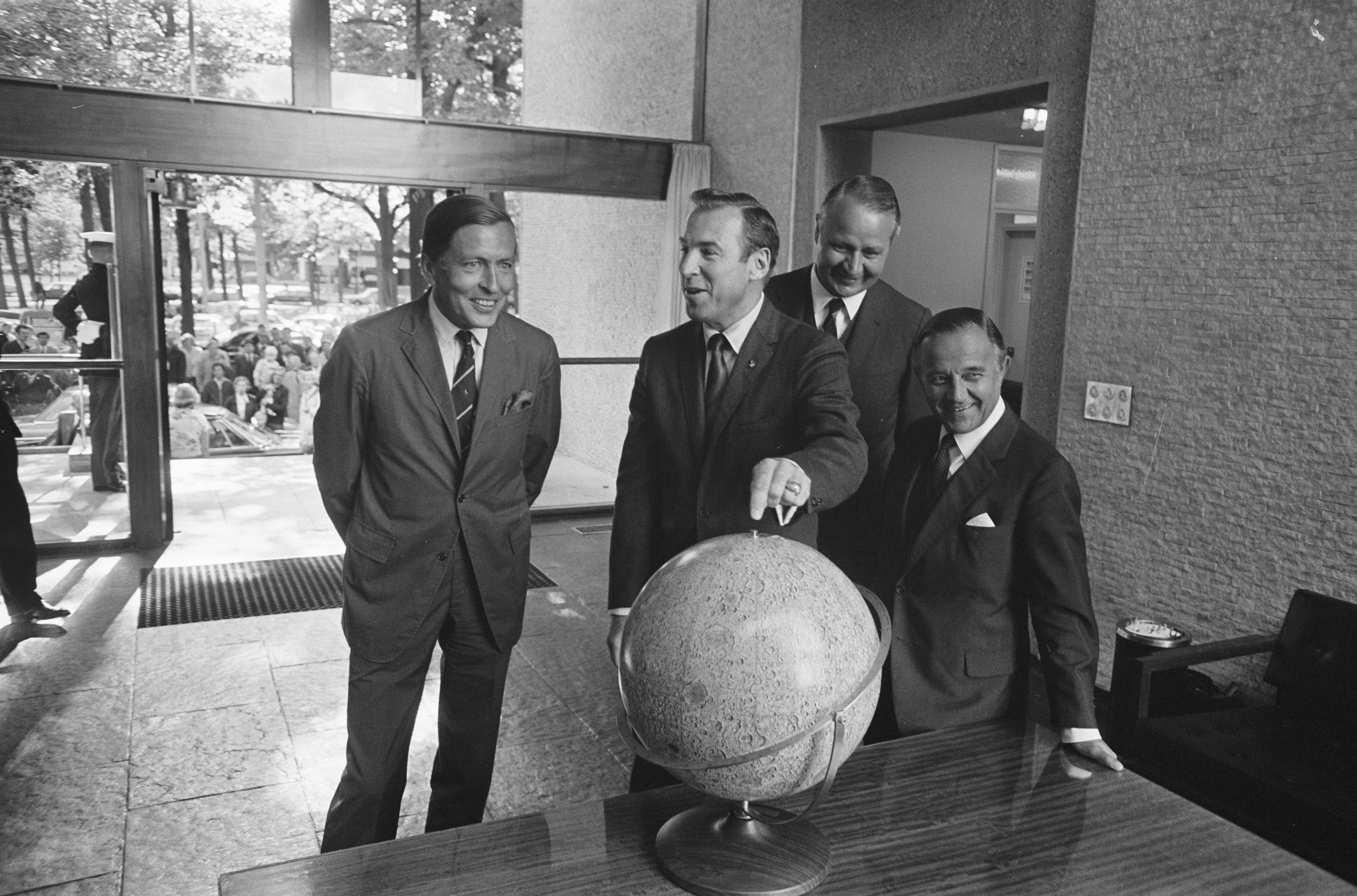 Collectie / Archief : Fotocollectie Anefo Reportage / Serie : [ onbekend ] Beschrijving : Z. K. H. Pr. Claus bij ontvangst. Amerikaanse astronaut James Lovell op Amerikaanse ambassade te Den Haag : Z. K. H. Pr. Claus bij ontvangst. v.l.n.r. Datum : 21 augustus 1969 Locatie : Den Haag, Zuid-Holland Trefwoorden : Ontvangsten, ambassades, ambassadeurs, prinsen Persoonsnaam : Claus, prins Fotograaf : Evers, Joost / Anefo Auteursrechthebbende : Nationaal Archief Materiaalsoort : Negatief (zwart/wit) Nummer archiefinventaris : bekijk toegang 2.24.01.05 Bestanddeelnummer : 922-7250